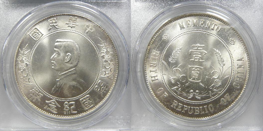 中華民國銀幣